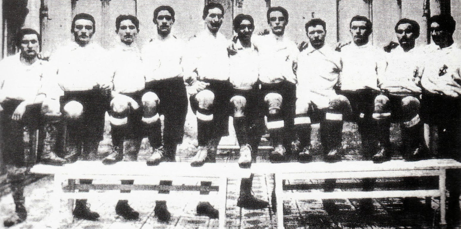 A line-up of S.G. Pro Vercelli in the 1909 season. From left to right: P. Ferraro (I), V. Fresia, A. Binaschi, G. Milano (I), G. Servetto, F. Milano (II), G. Ara, G. Innocenti, P. Leone, C. Rampini (I), C. Corna.